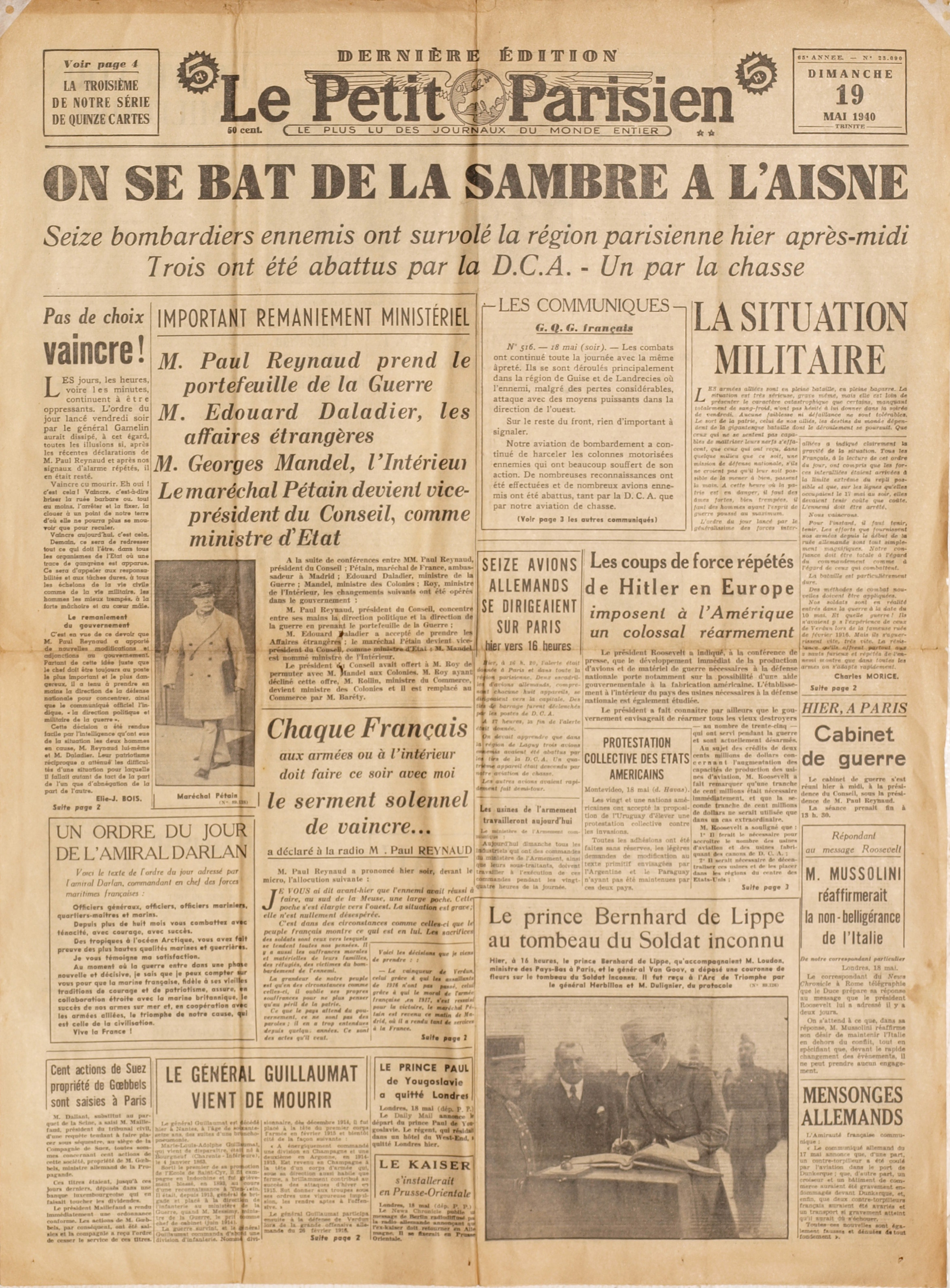 Le Petit Parisien n° 23.090 du 19 mai 1940 ; la une